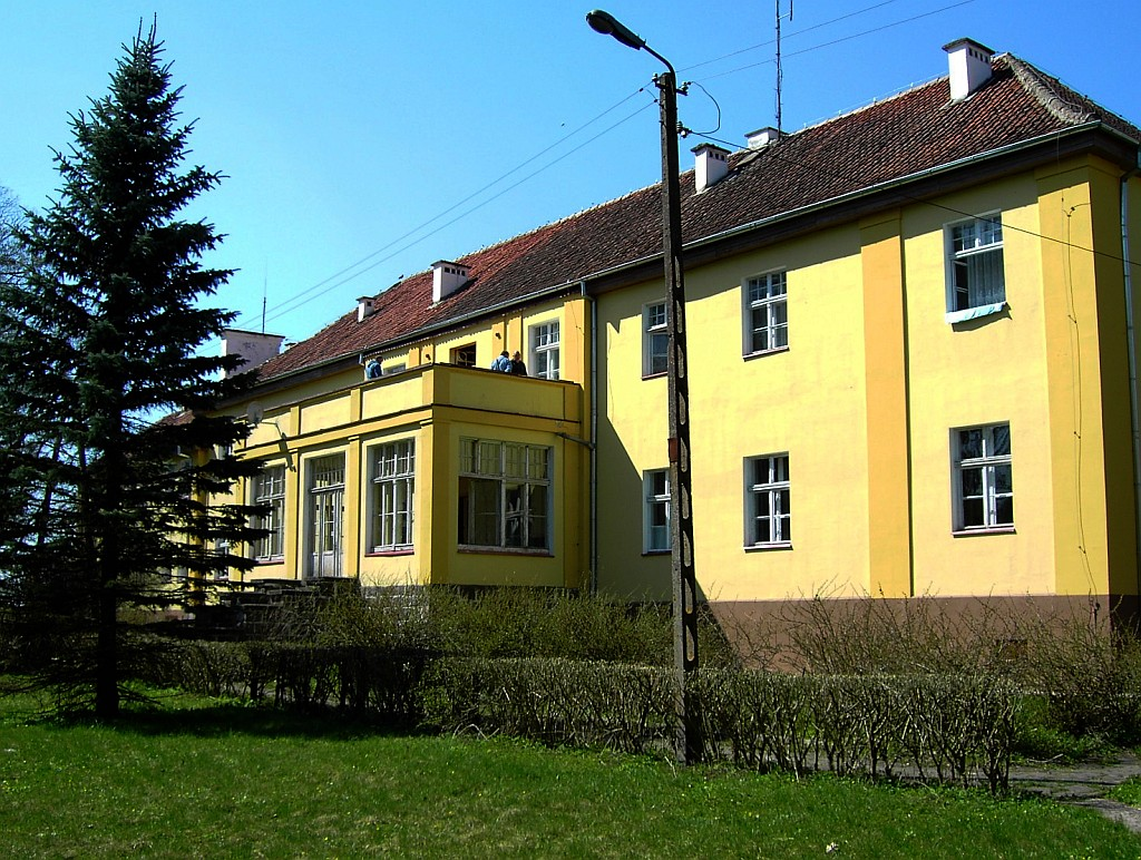 Pałac w Rudziszkach.